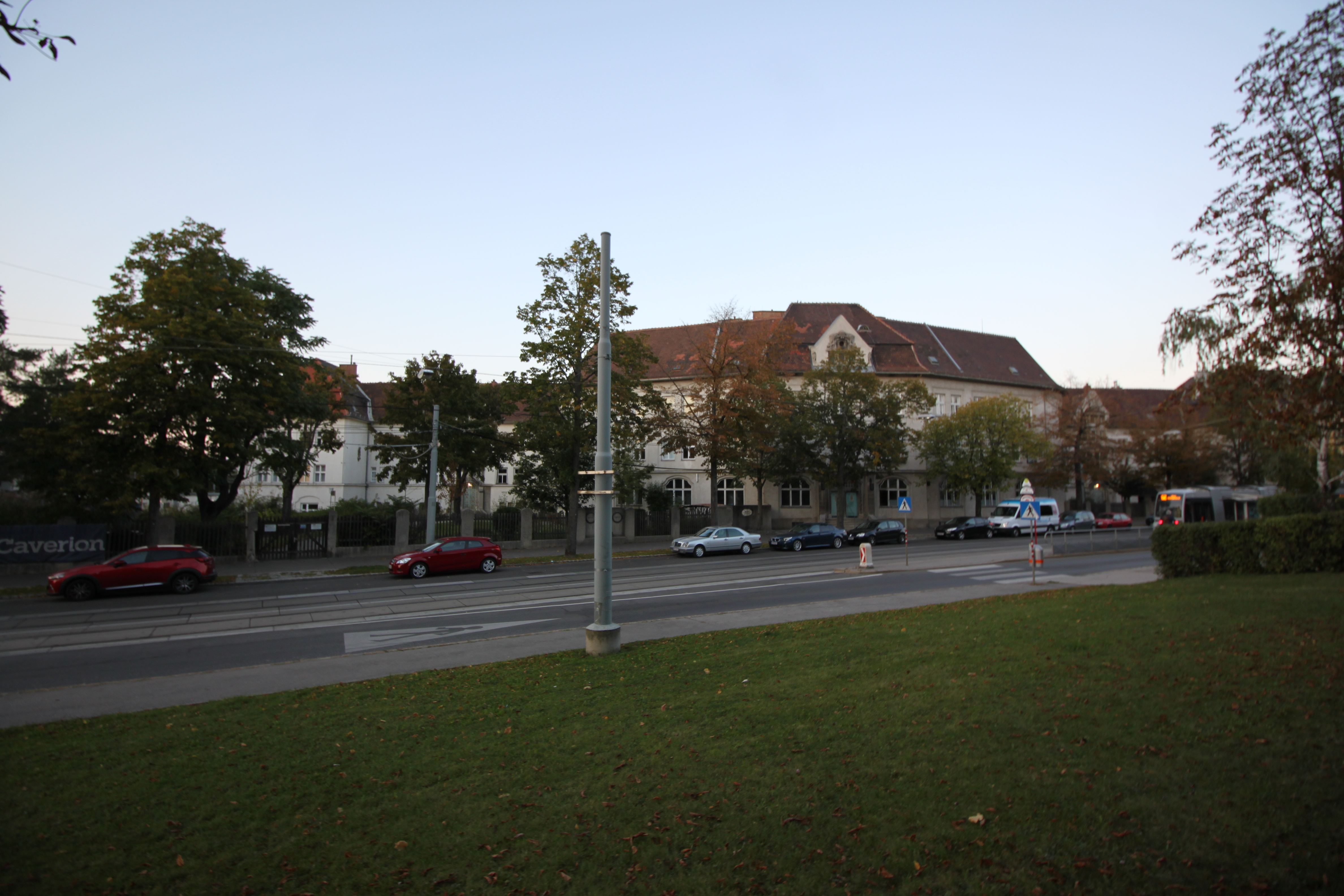 Verwaltungs- und Wohngebäude der Straßenbahnremise Speising (TU), linker Seitenrisalit und mittige vorspringende Front hinter Bäumen erkennbar